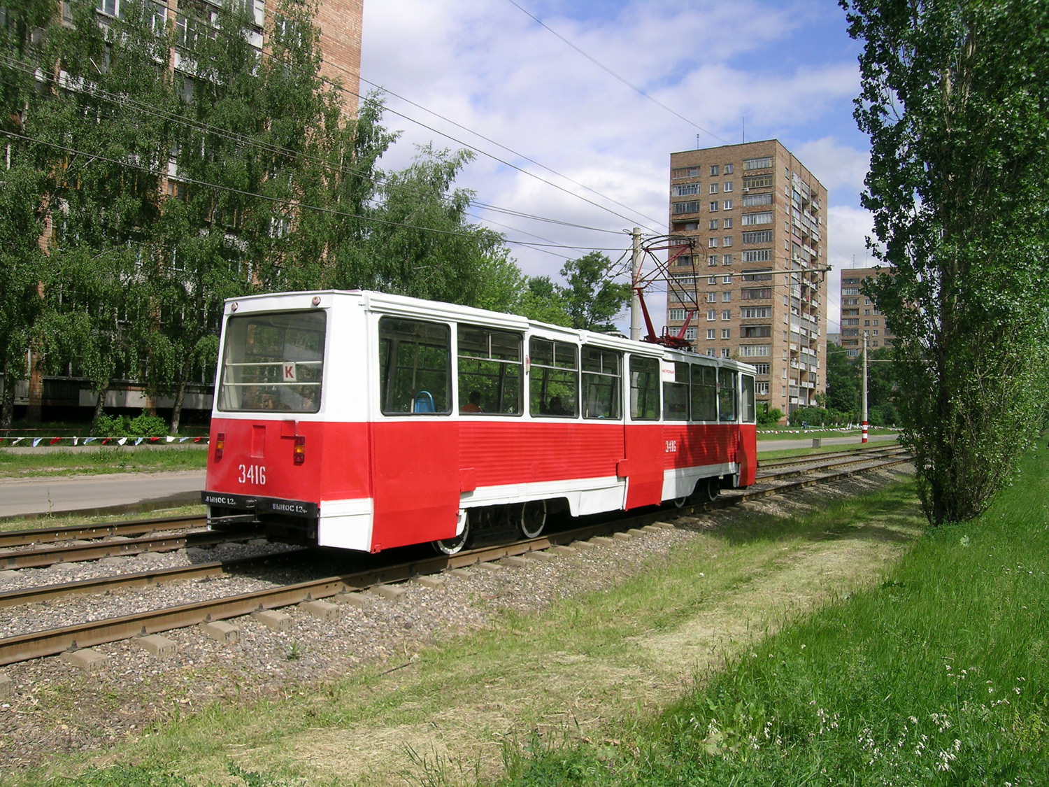 Трамвайный вагон 71-605 (КТМ-5) в Нижнем Новгороде, на демонтированной в 2009 году линии по проспекту Ленина. Вид сзади справа.